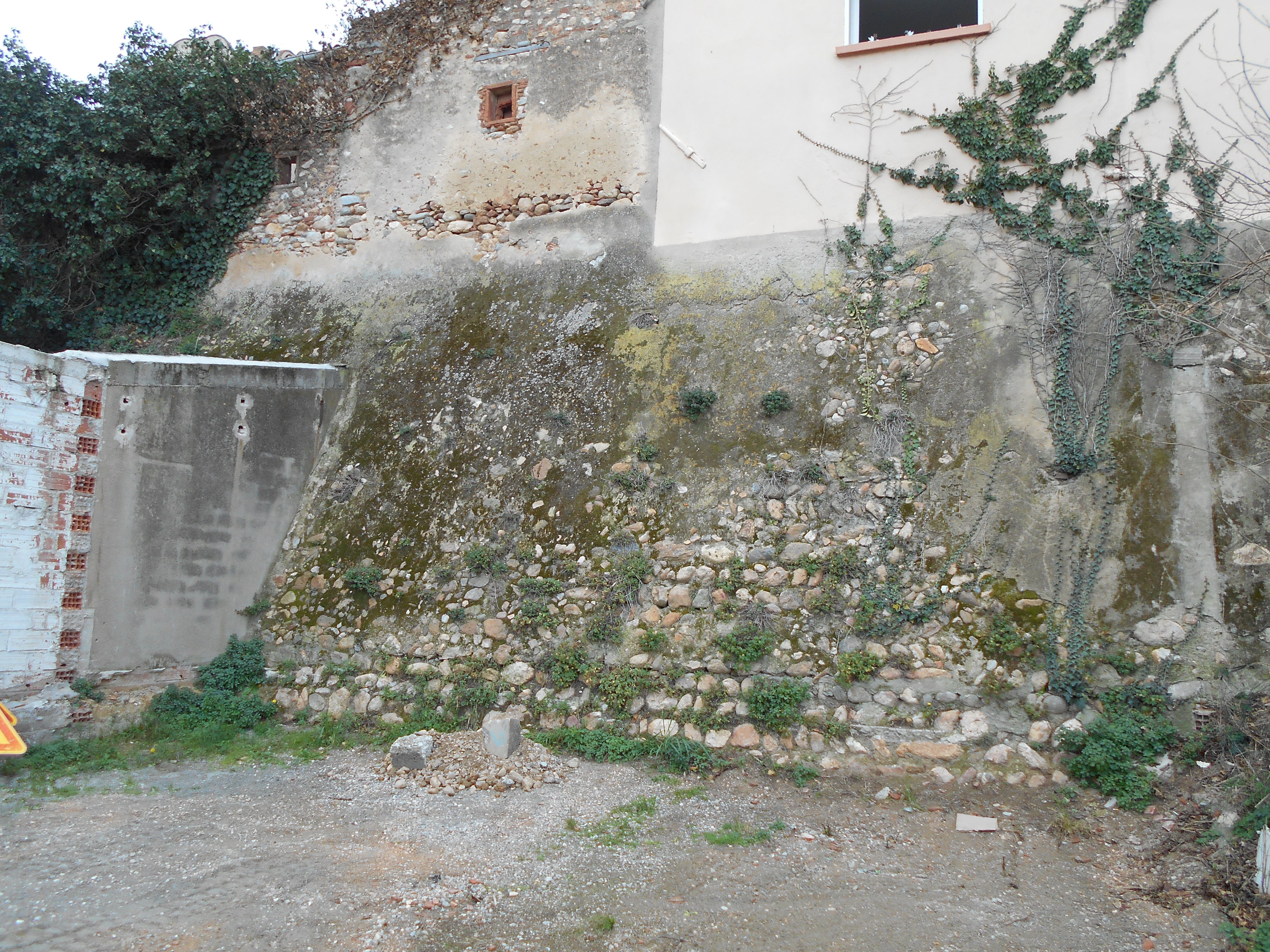 Muralles de Banyuls dels Aspres